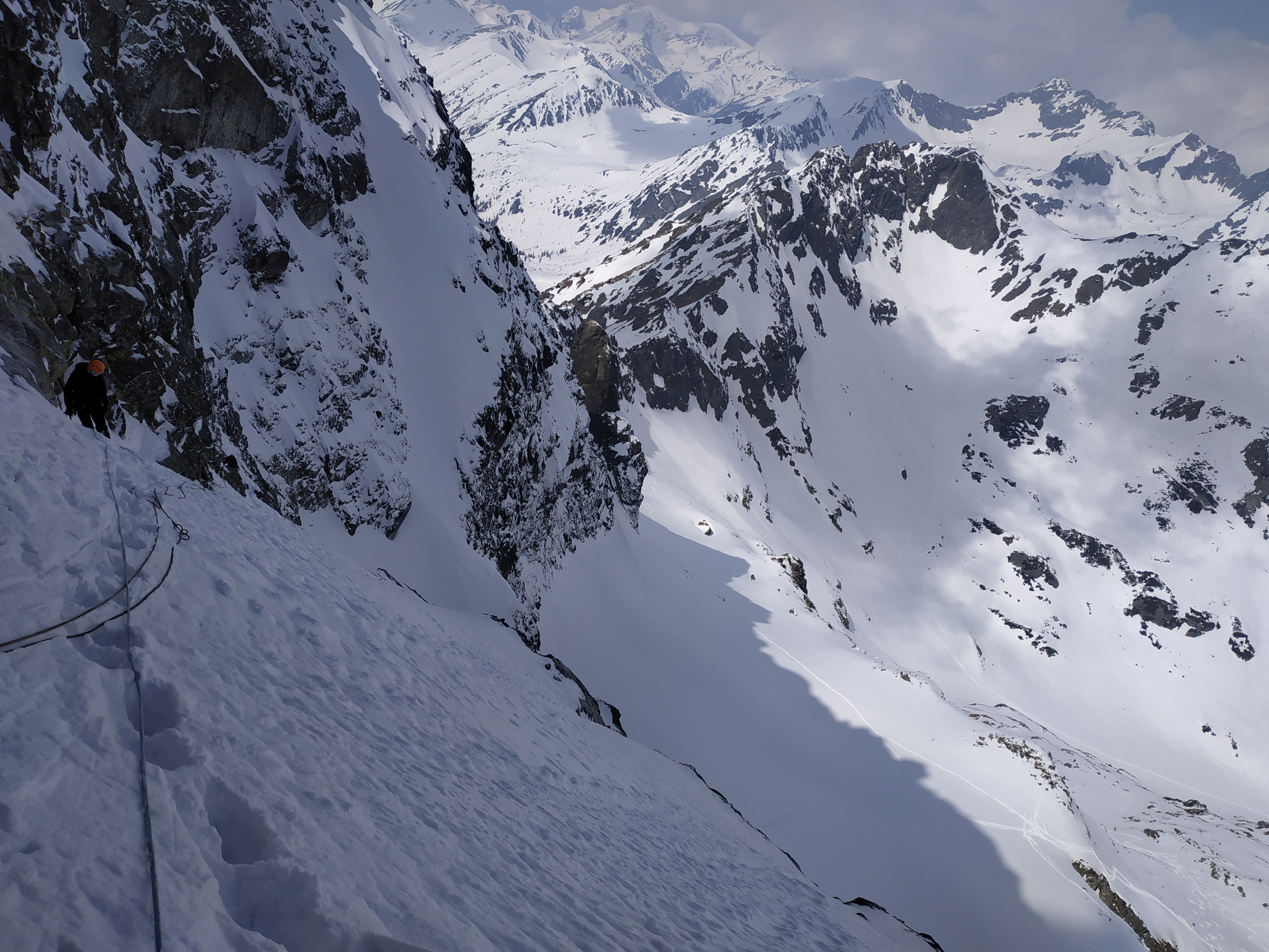 Wspinaczka w masywie Cubryny w Zadniej Galerii Cubryńskiej